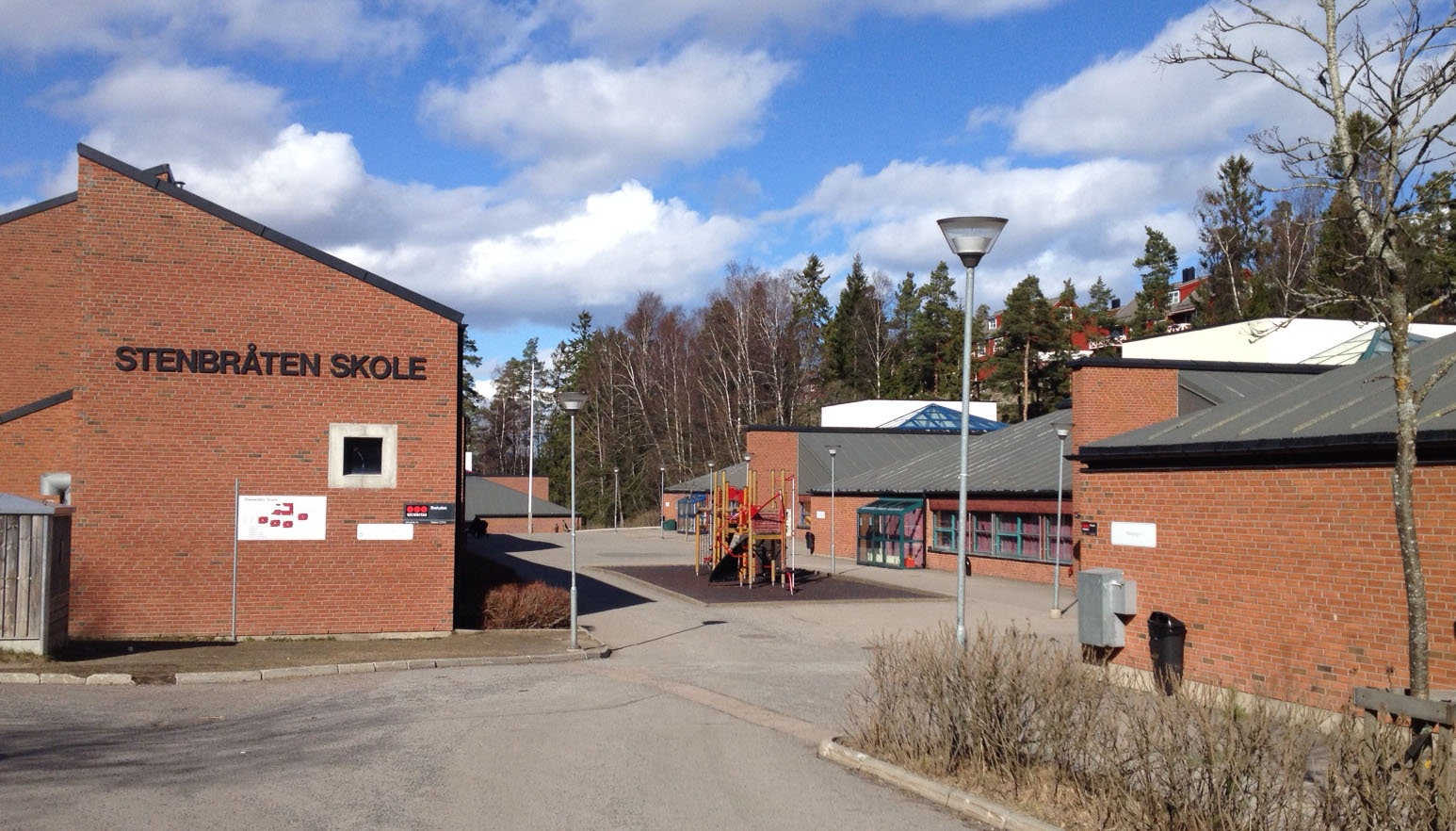 Stenbråten skole i Oslo